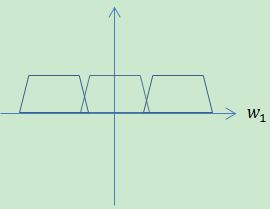 1D Filter Bank